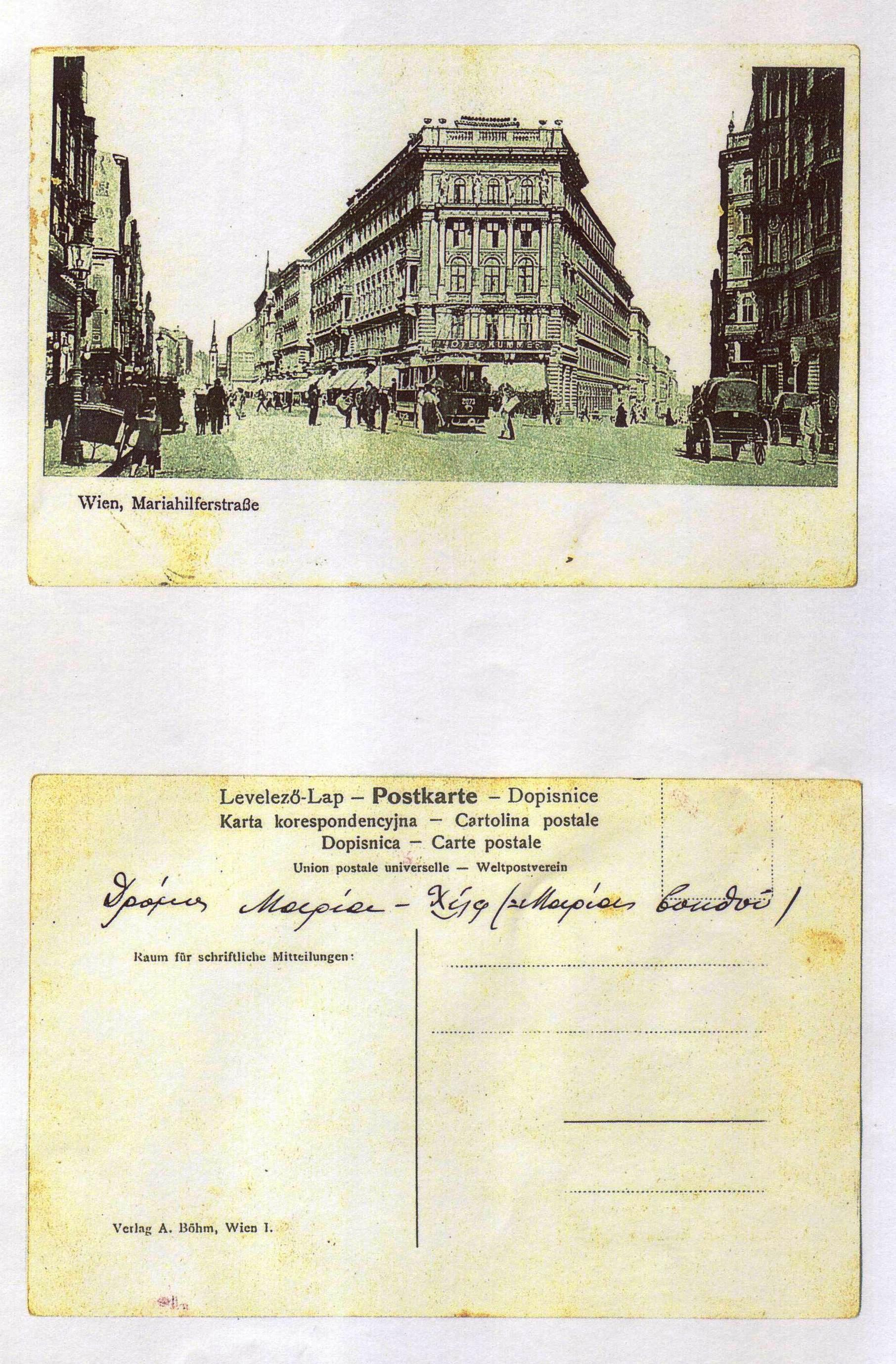 καρτ ποστάλ Βιέννης με χειρόγραφη επεξήγηση